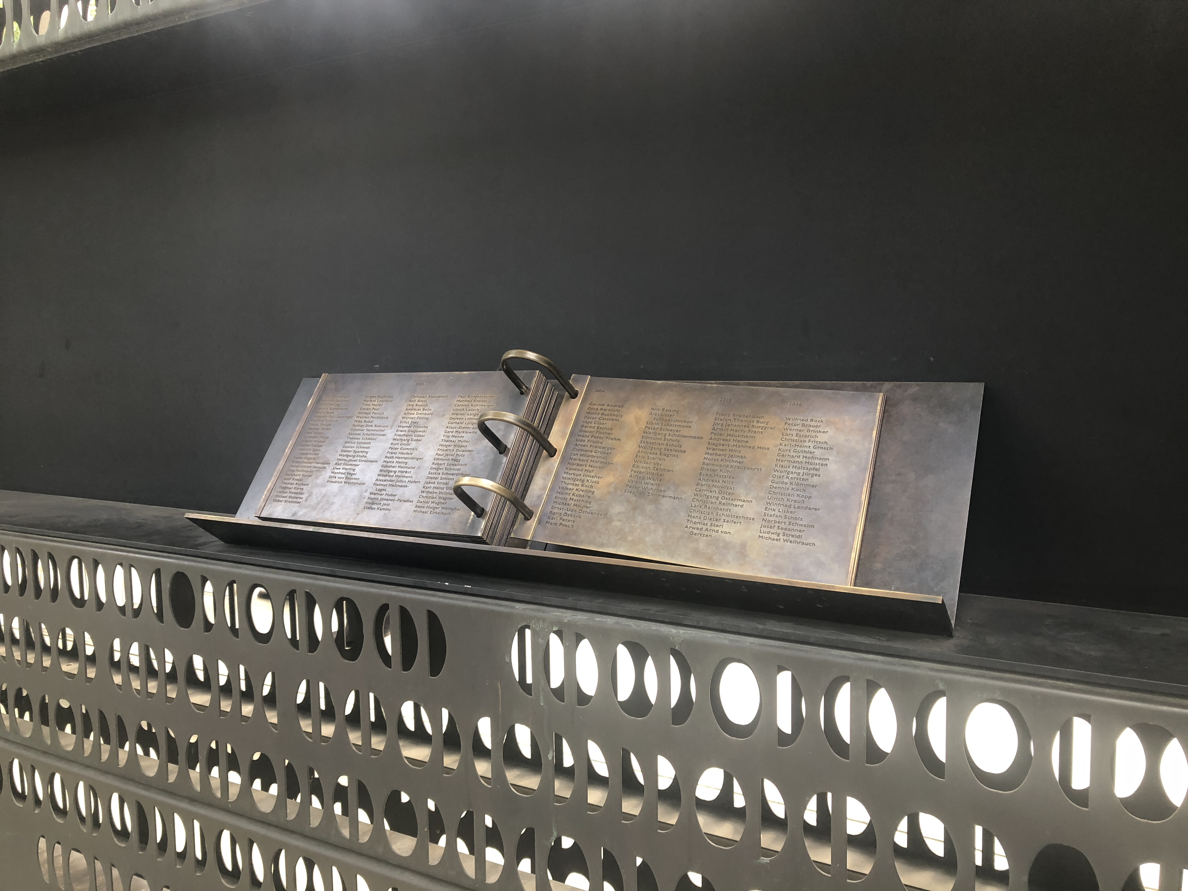 Das 2014 eingeweihte Buch des Gedenkens besteht aus 20 Bronzeplatten, auf denen die Namen aller Toten der Bundeswehr verzeichnet sind. Die Namen der Verstorbenen sind nach dem Jahr ihres Todes geordne